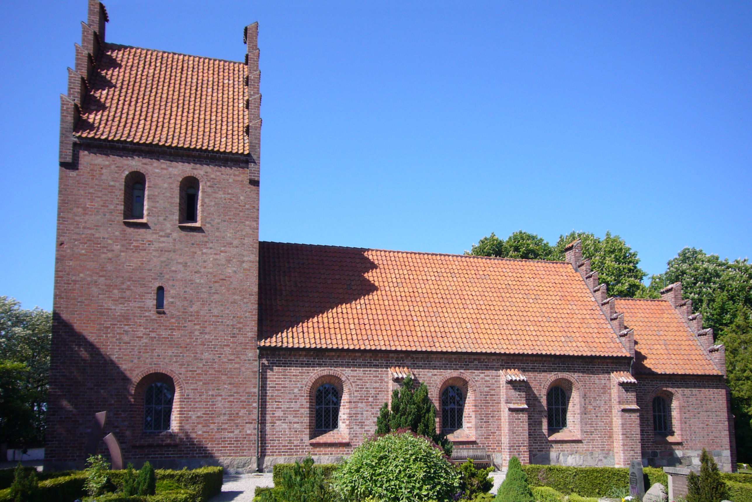 Reerslev Kirke, Høje-Taastrup, Roskilde County, Denmark.